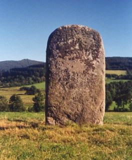 Description: Menhir de la Pierre Plantée, Lacaune, France, 81 Source: Hugo Soria Licence: GFDL Hugo Soria